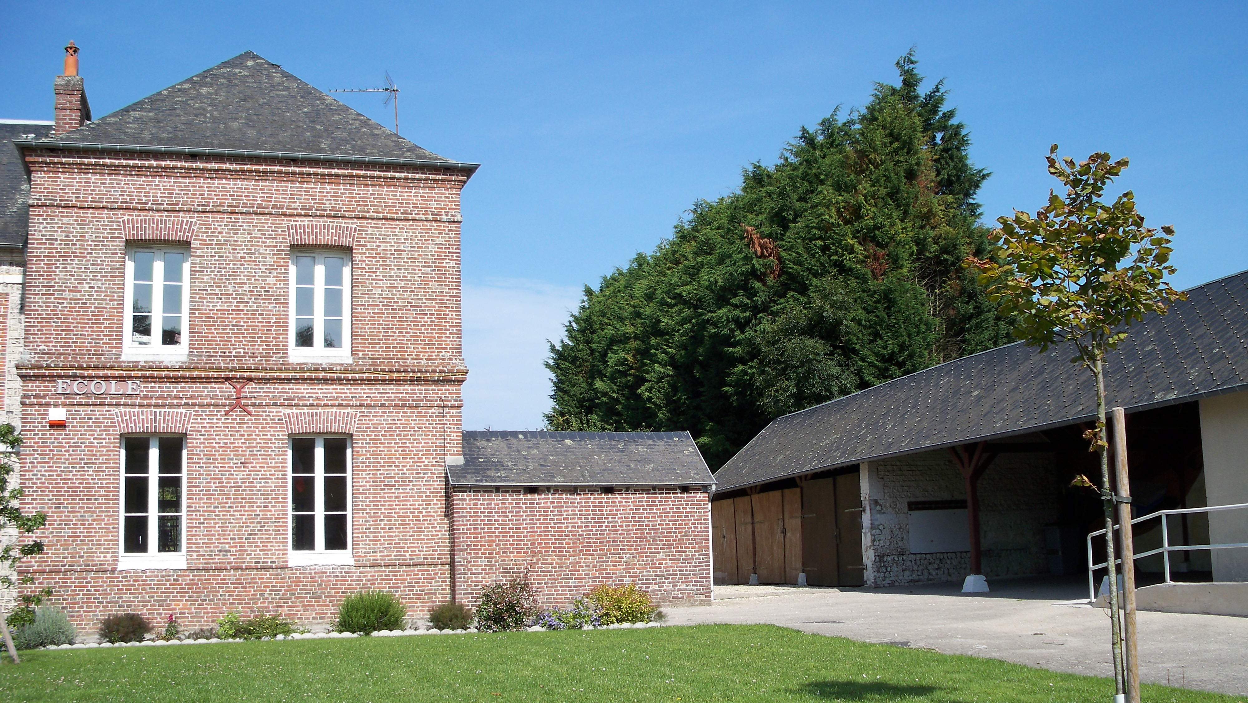 L'établissement scolaire de la commune de Theuville-aux-Maillots